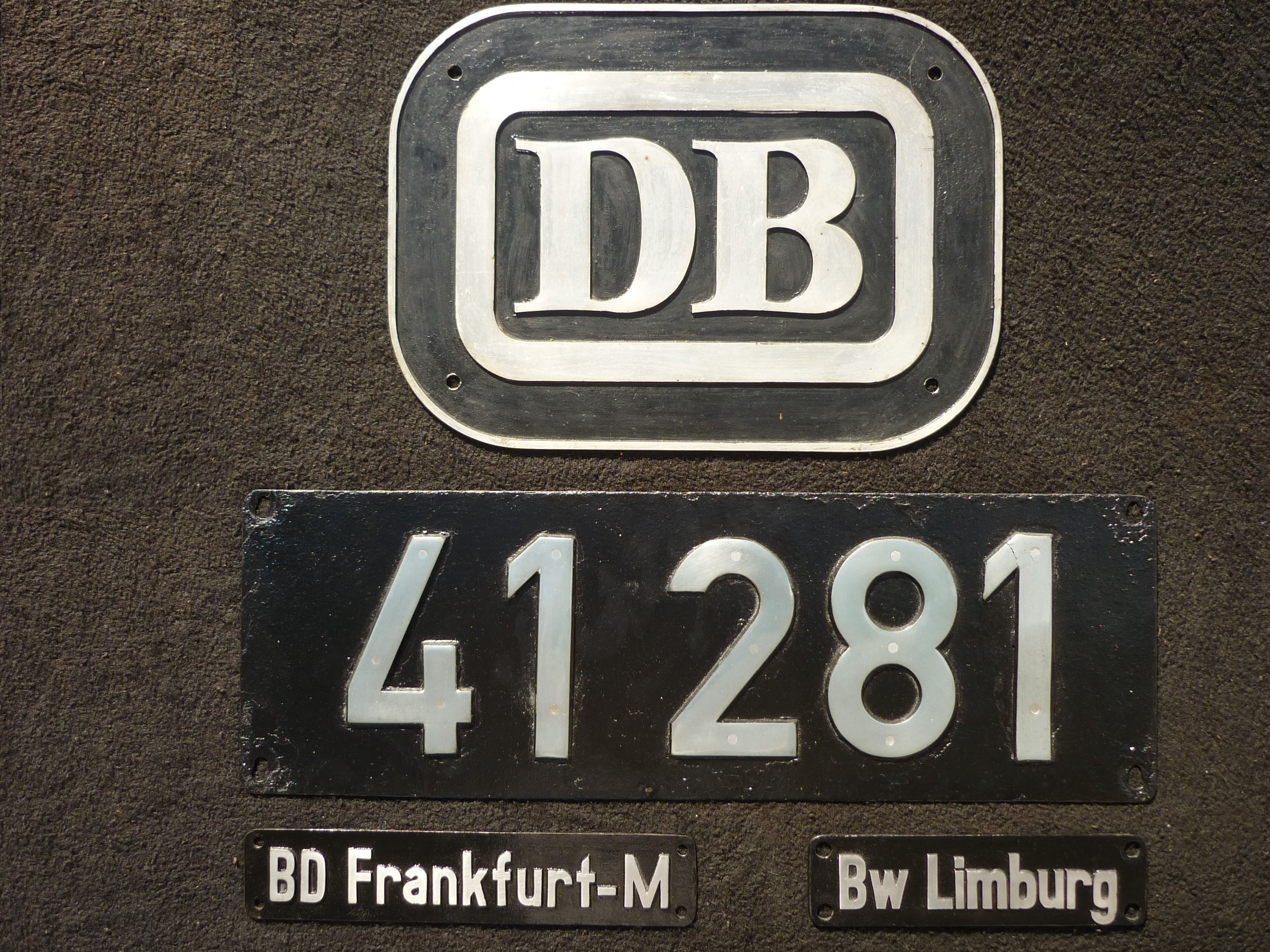 Staatsbahn (Deutsche Bundesbahn), Loknummernschild (Typ 41) und Ordnungsnummer (281), Bahndirektion (BD), Beheimatung im Bahnbetriebswerk (Bw).